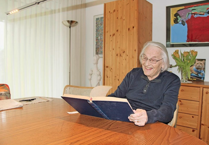 Arthur Loosli an seinem 90. Geburtstag im Jahr 2016.